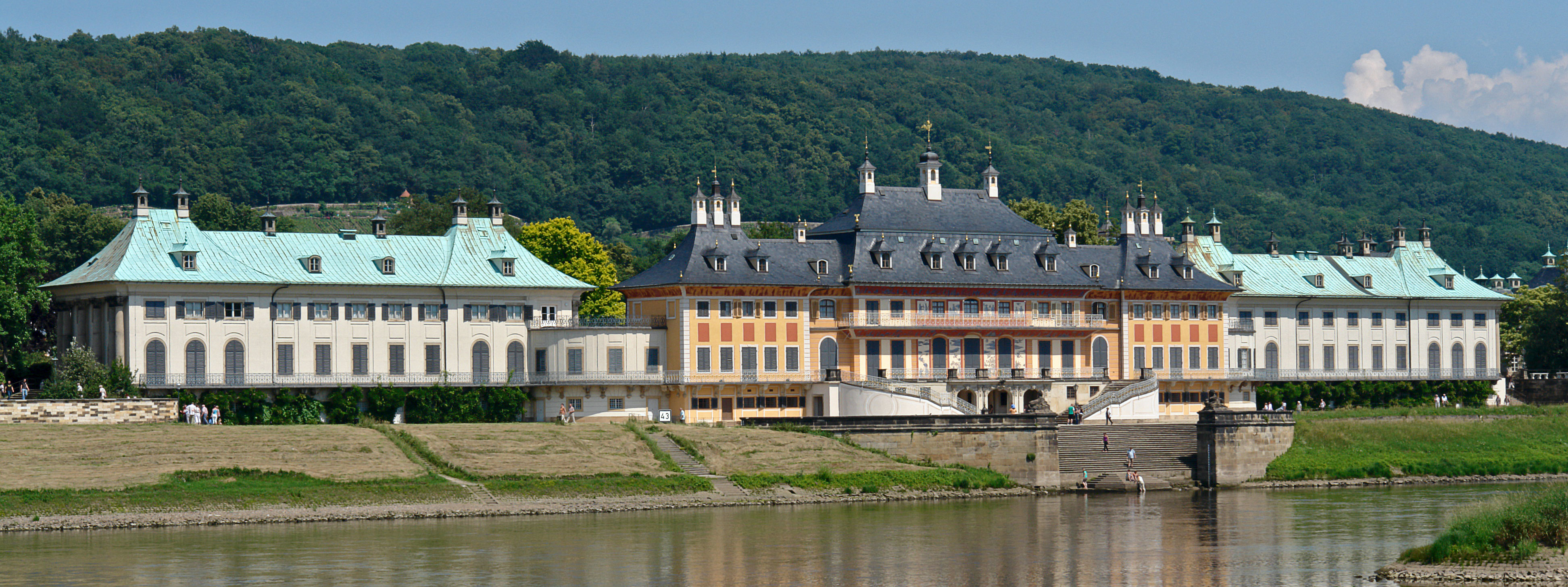 Blick über die Elbe auf das Schloss Pillnitz (Wasserpalais) von Kleinzschachwitz aus.